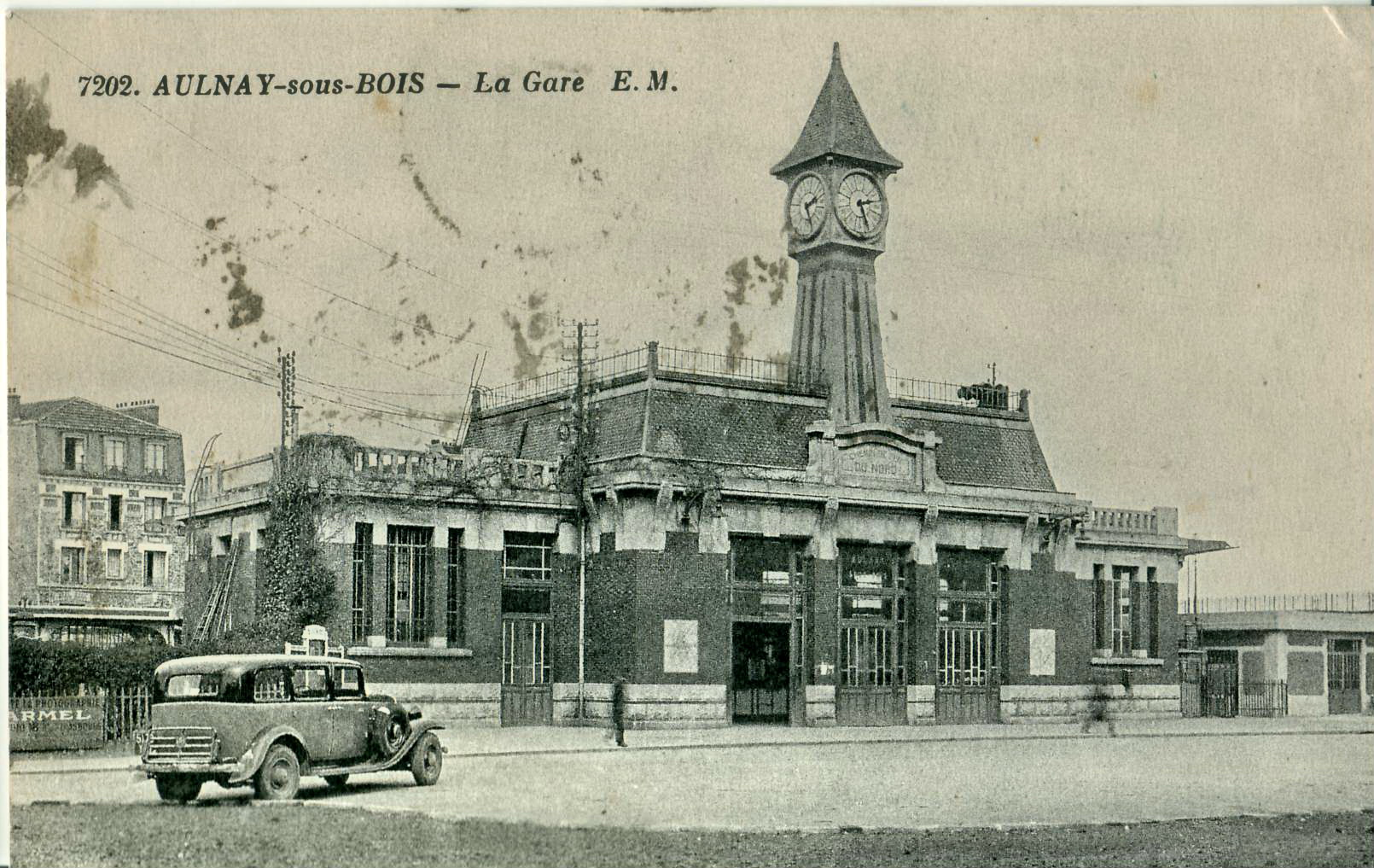 Carte postale ancienne éditée par EM, N° 7202 AULNAY-SOUS-BOIS : La Gare, construite vers 1913.